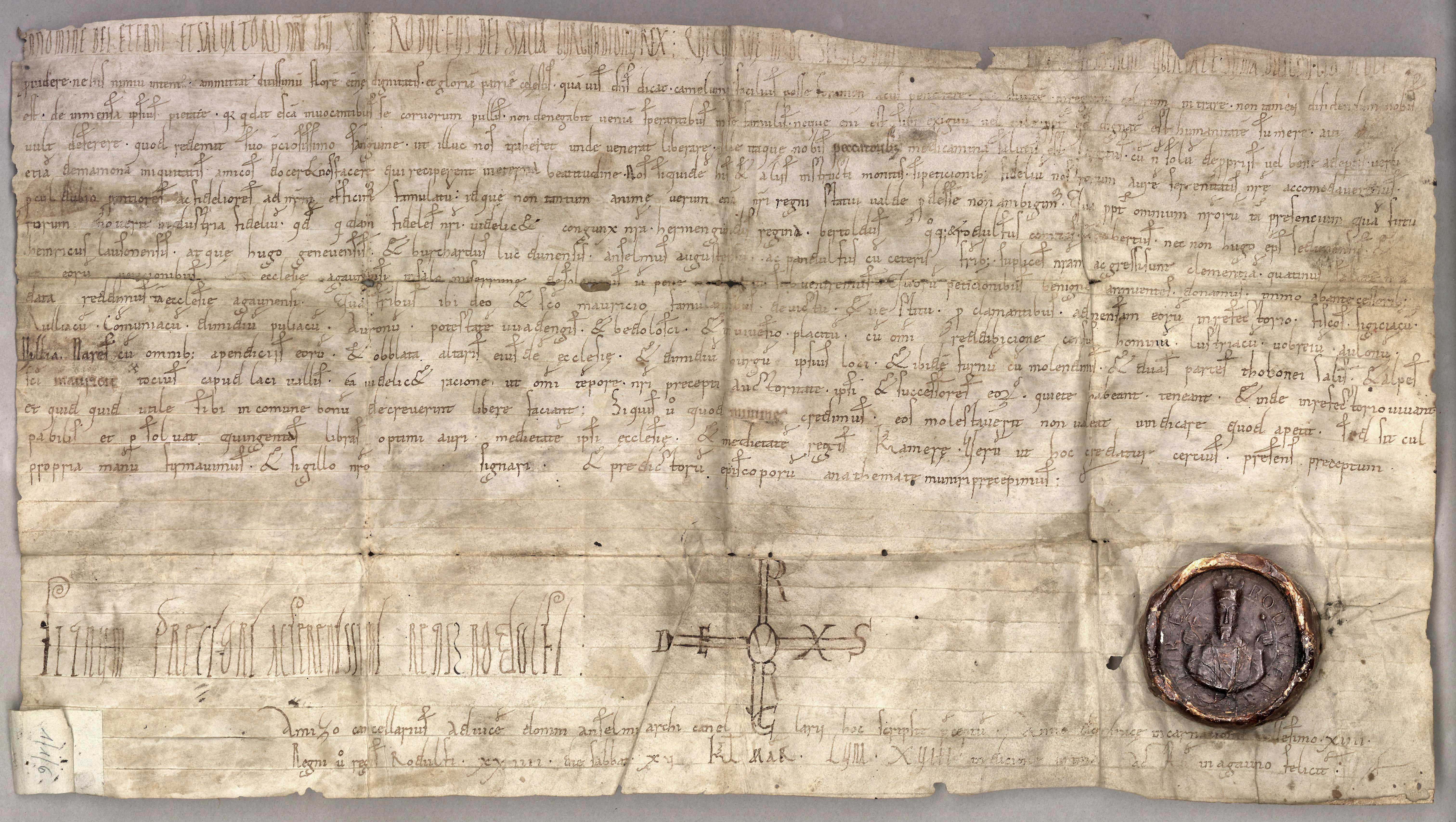 Acte de donation du roi de Bourgogne Rodolphe III à l'abbaye Saint-Maurice (15 février 1018). Source : Fondation des Archives historiques de l'abbaye de Saint-Maurice